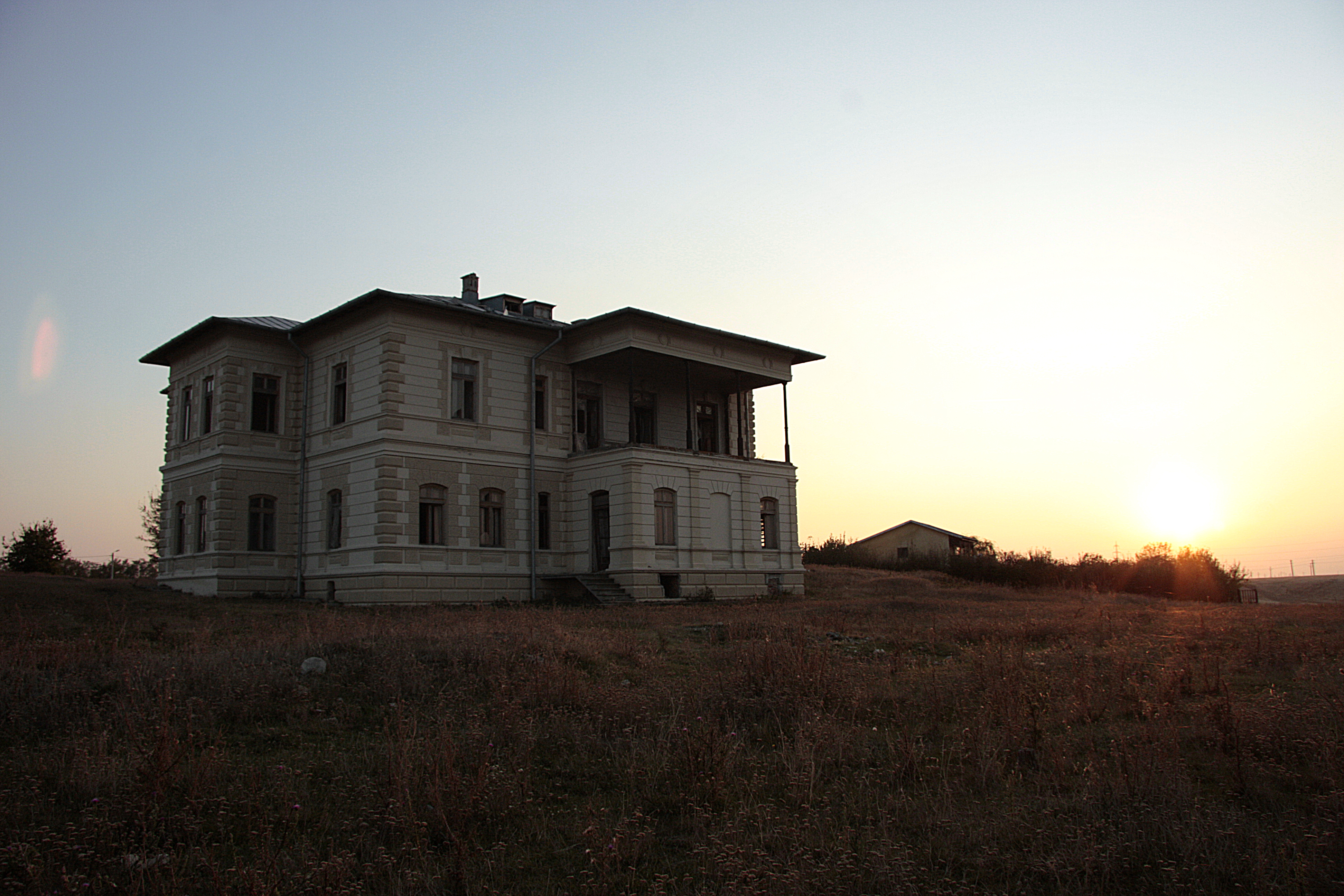 Conacul Marghiloman, localitatea Hagiești, județul Ialomița, România